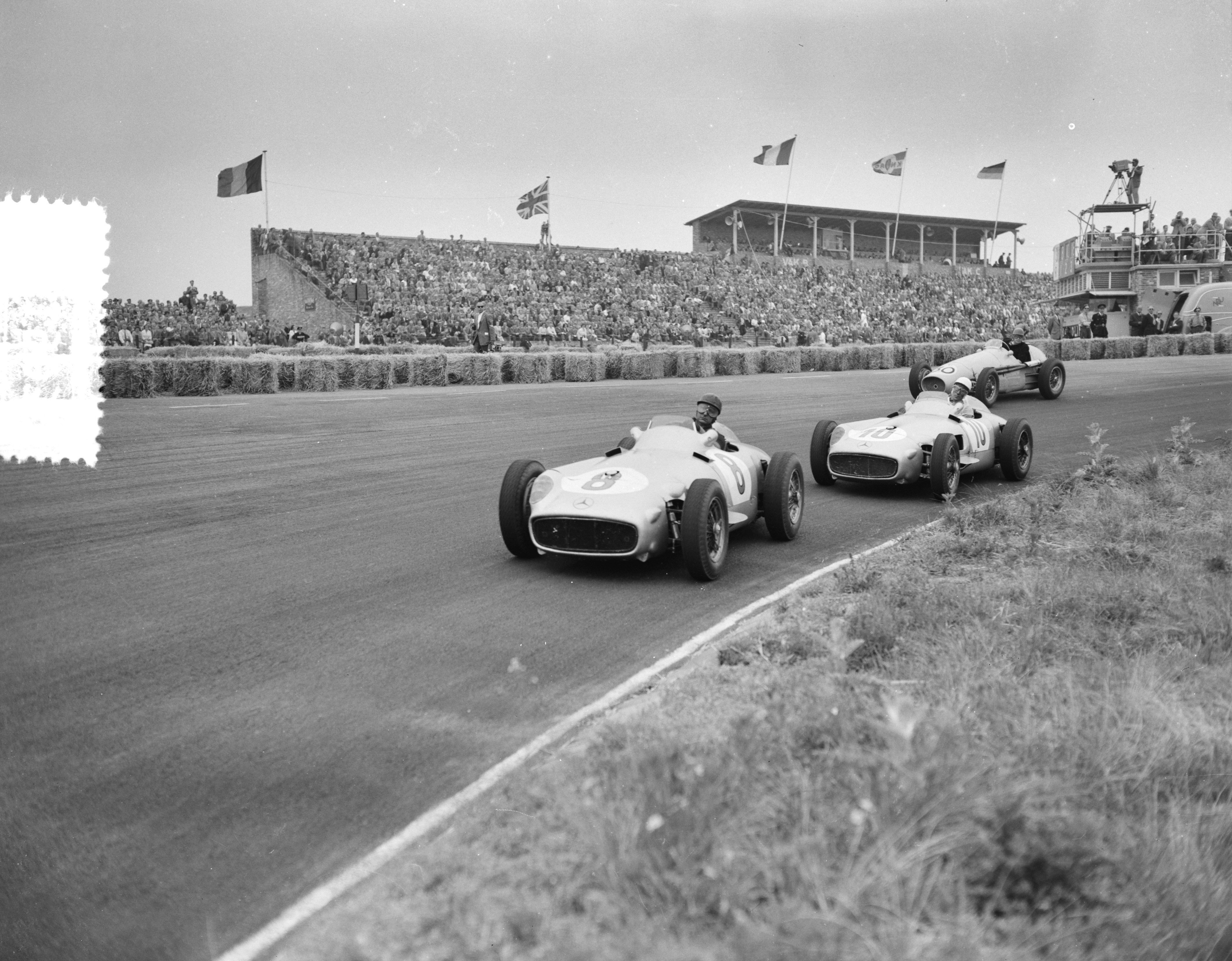 Collectie / Archief : Fotocollectie Anefo Reportage / Serie : [ onbekend ] Beschrijving : Grote Prijs van Nederland Zandvoort. Vooraan J. M. Fangio in Mercedes (de latere winnaar), daarachter teamcollega Stirling Moss Datum : 19 juni 1955 Locatie : Noord-Holland, Zandvoort Trefwoorden : auto's, sport Persoonsnaam : Fangio J.M., Moss, Stirling Instellingsnaam : Mercedes Fotograaf : Pot, Harry / Anefo Auteursrechthebbende : Nationaal Archief Materiaalsoort : Negatief (zwart/wit) Nummer archiefinventaris : bekijk toegang 2.24.01.04 Bestanddeelnummer : 907-1903